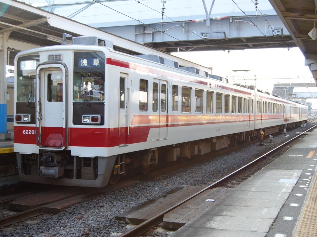 会津鉄道6050系200番台電車62201編成（2008-10-4・新栃木にて撮影）